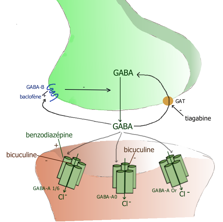 Les différents types de récepteurs GABAergiques